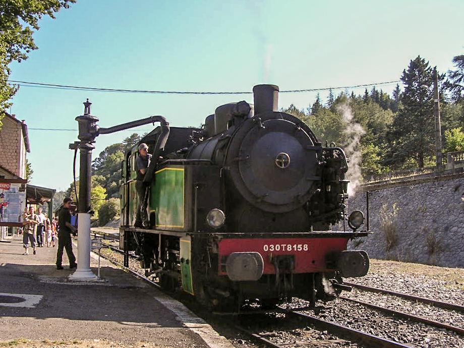 France - Anduze - Chemin de fer de Anduze à Saint-Jean-du-Gard — Train à vapeur des Cévennes — Locomotive à vapeur 030T 8158. Cette locomotive initialement utilisée dans les houillères des Cévennes est la dernière à avoir été construite pour le réseau français en 1953. Entièrement restaurée par la Citev (Compagnie exploitante de la ligne Anduze-Saint Jean du Gard), après 4 ans de travaux, elle a pris son service entre Anduze et Saint Jean du Gard en 1994. Puissance : 700 Cv, Vitesse : 50 km/h, pression maximale vapeur : 14kg/cm2 (Source : Panneau d'information en gare d'Anduze)